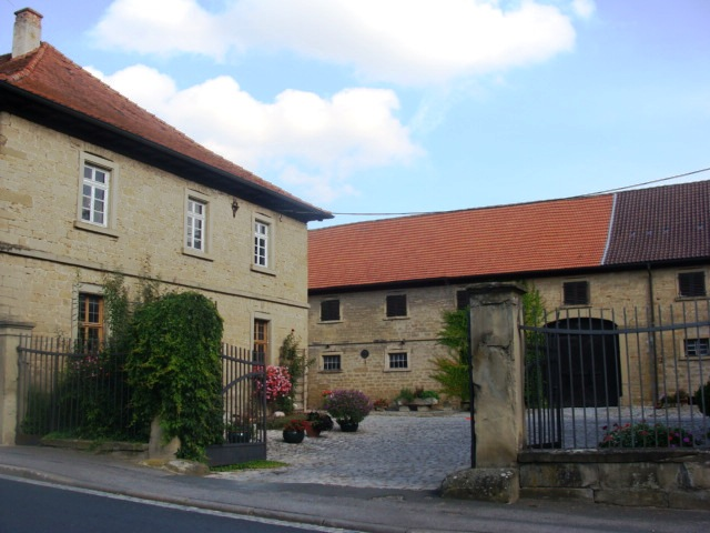 Gutshof, Schweinfurter Straße 38, Volkach-Gaibach, zwei Wohnhäuser und Wirtschaftsgebäude in Hufeisenform, zweigeschossige Bruchsteinbauten mit Walmdach, mittleres 19. JahrhundertThis is a photograph of an architectural monument.